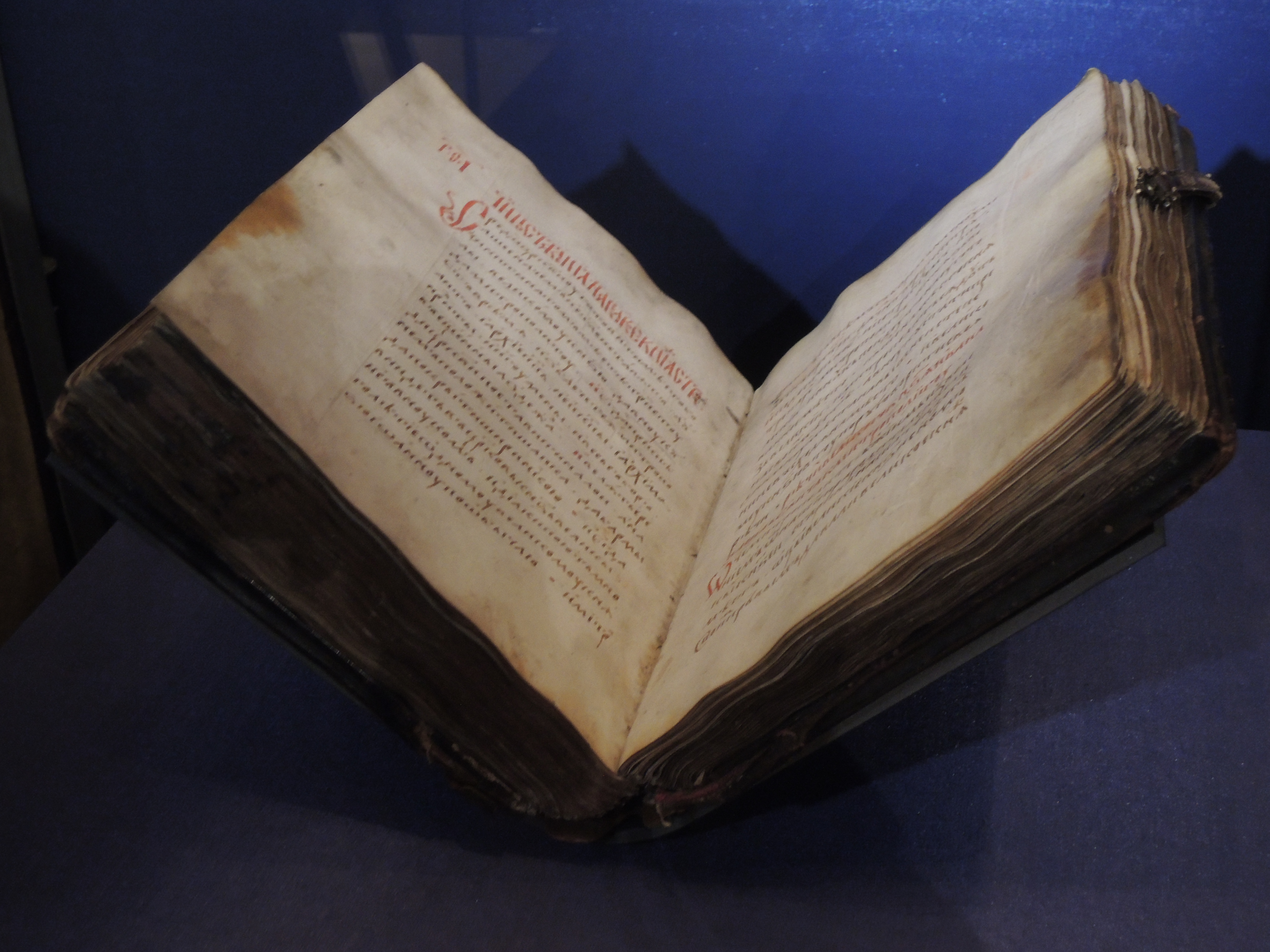 Чин поставления на великое княжество князя Димитрия Ивановича, внука вел. кн. Ивана III Васильевича. Москва, к. 14 - нач. 16 в. Пергамен, чернила, киноварь, дерево, кожа, медь. ГИМ. Поставление на великое княжение Димитрия Ивановича, внука великого князя Московского Ивана III, произошло в 1498 году в кремлевском Успенском соборе. Для этого события был написан специальный "Чин поставления", который, как отмечают исследователи, восходит к византийским чинам венчания императоров. Текст Чина написан позднее, чем текст всей рукописи. Помещенный в "Требнике", он является самым ранним списком русских чинов венчания. Пергаменные листы с "Чином поставления" вставлены в "Требник" между листами 142-154. После "Чина поставления" помещена историческая запись о совершении священнодействия в 1498 году, запись выполнена рукой того же писца.